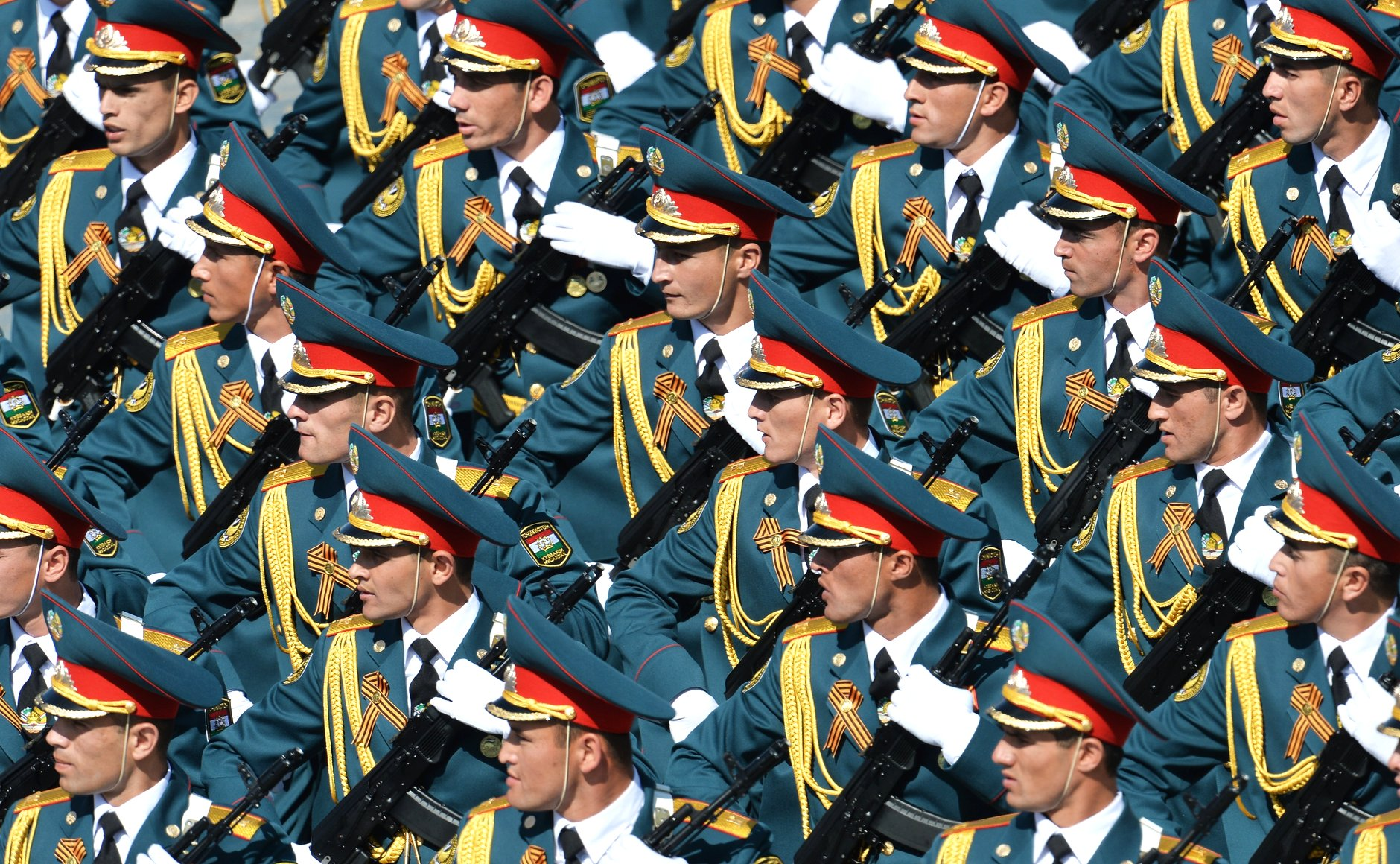 Военнослужащие Вооруженных сил Таджикистана во время военного парада в ознаменование 70-летия Победы в Великой Отечественной войне 1941–1945 годов.